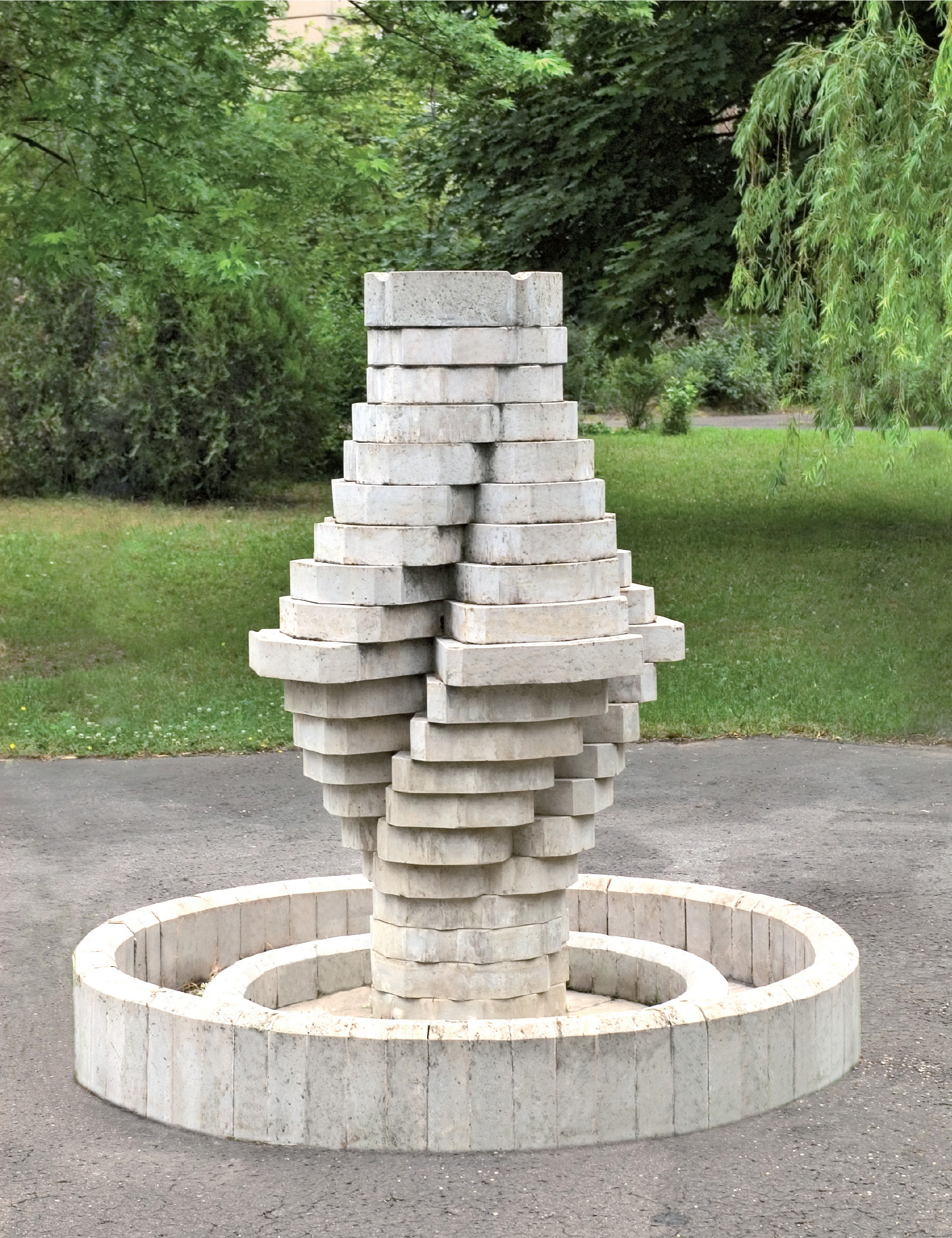 Mészkőből készült szökőkút Kecskeméten (210 cm), Pálfy Gusztáv alkotása (1990)